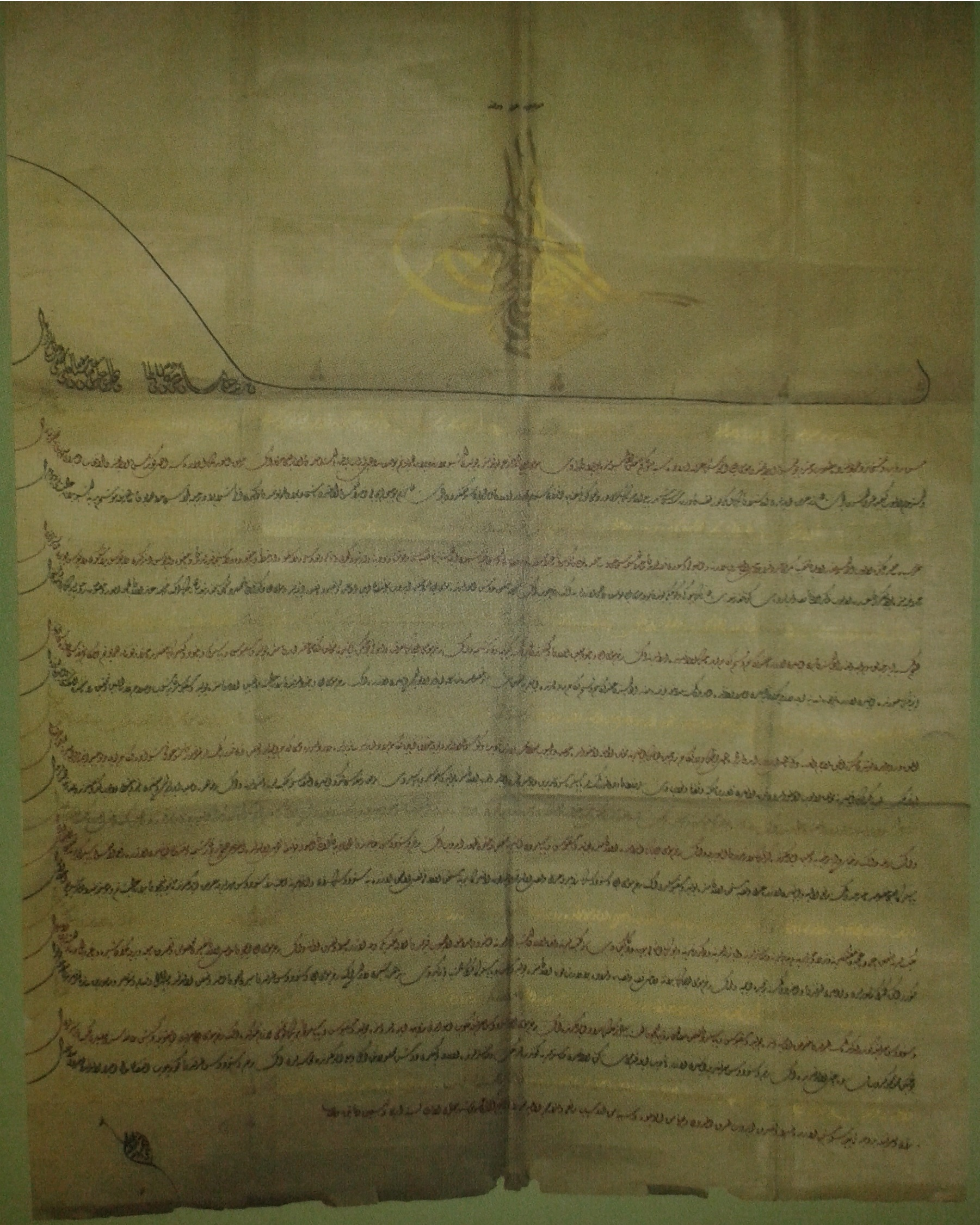 Берат на султан Абдул Азис, с който се определят границите на Българската екзархия